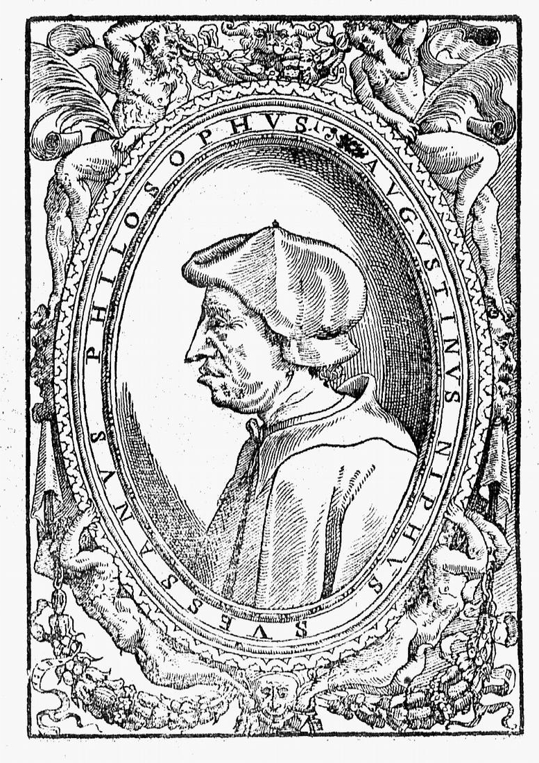 Philosophus Augustinus Niphus Suessanus